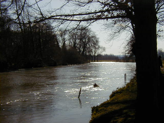 Commentaire : si un "autochtone" peut repérer l'endroit plus précisément... Contents 1 Licensing 2 Auteur 3 Licensing 4 Original upload log Licensing GFDL Auteur Arnaudus (2000) Arnaudus (2000)